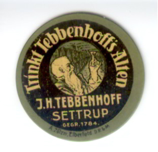 Briefmarkenkapselgeld Vorderansicht (Bildersteller/Besitzer Norbert Luffy; 52223 Stolberg)